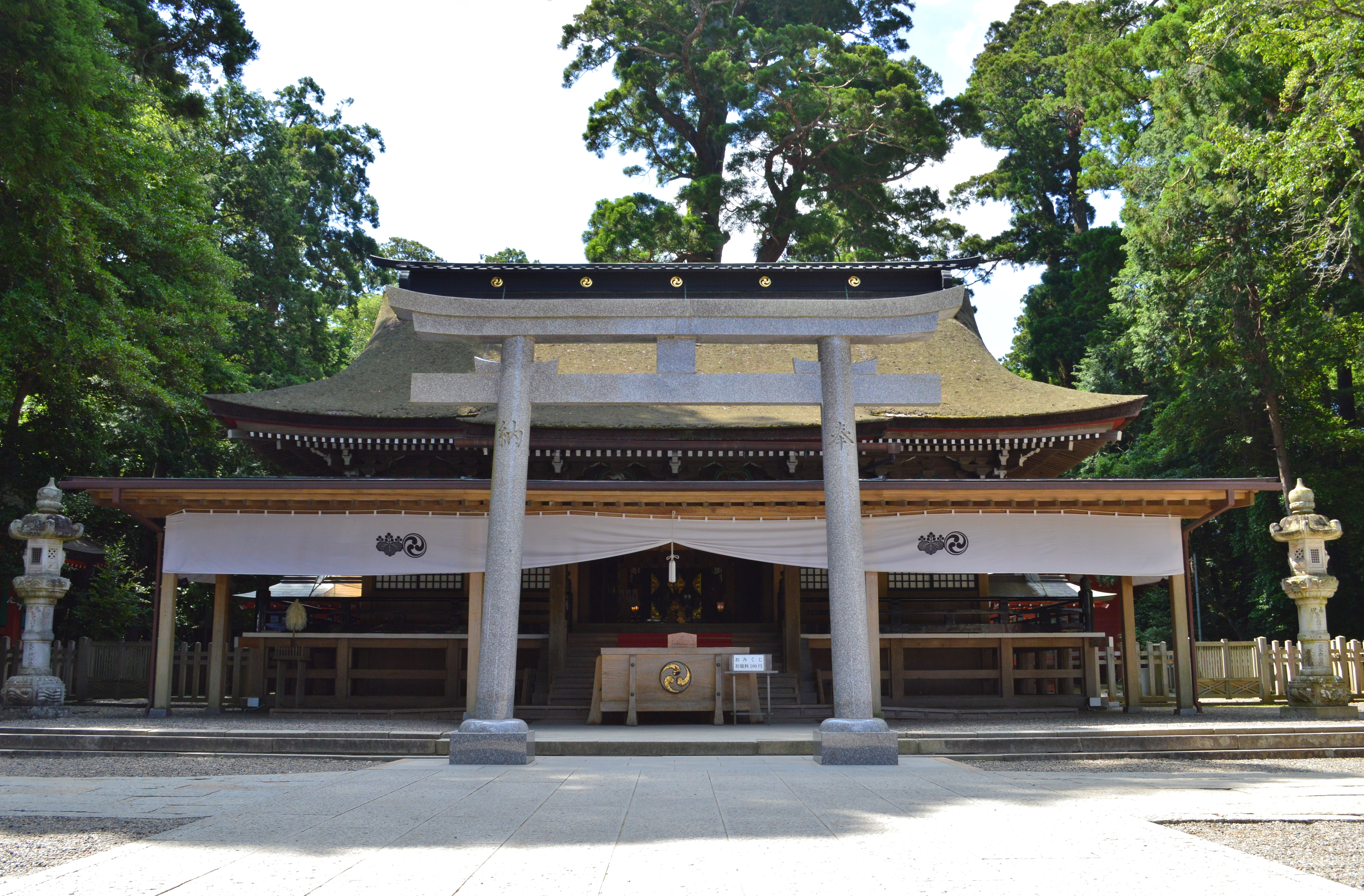 鹿島神宮 拝殿-1